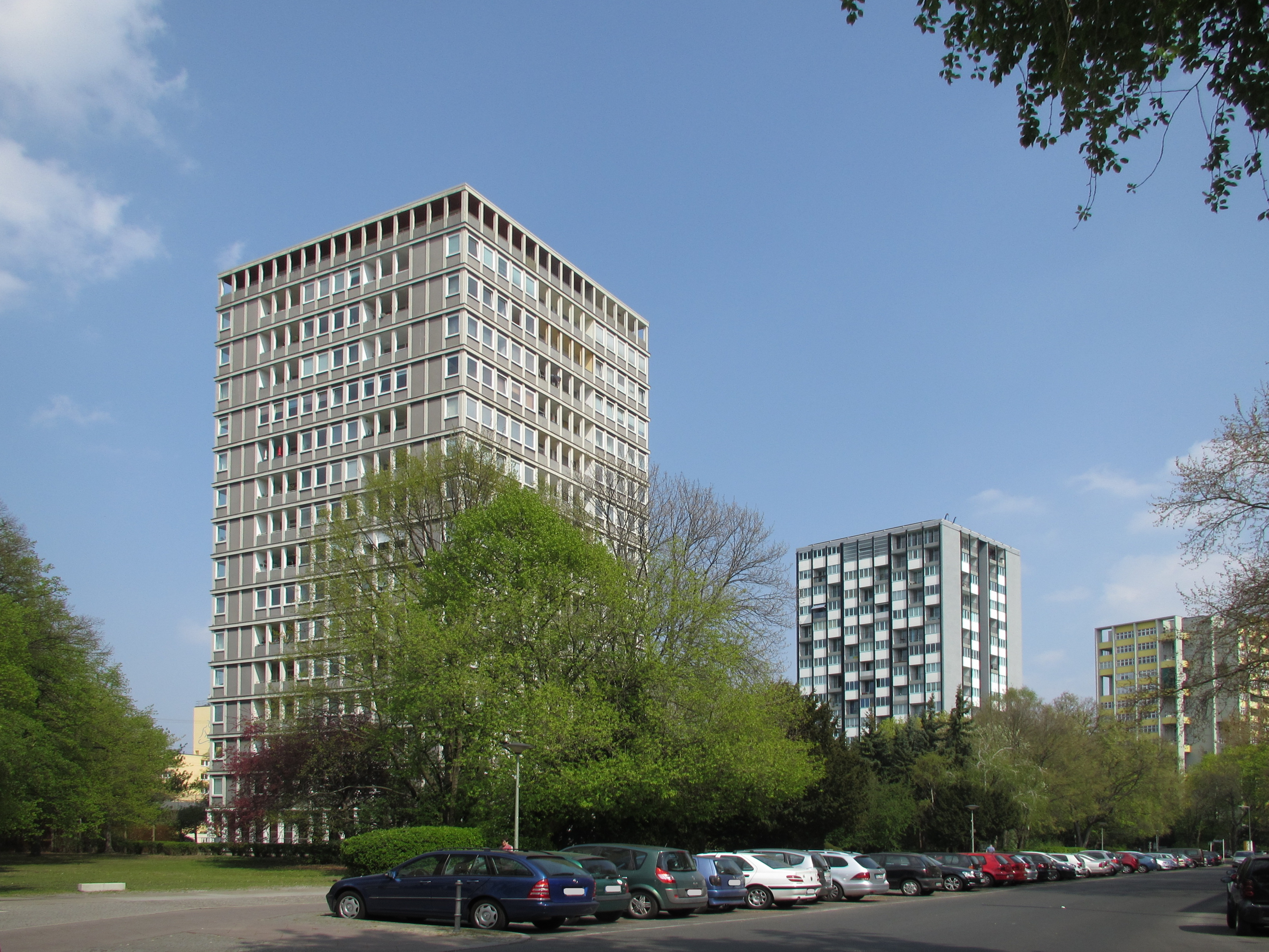 Häuser im Hansaviertel in Berlin (Bartningallee)